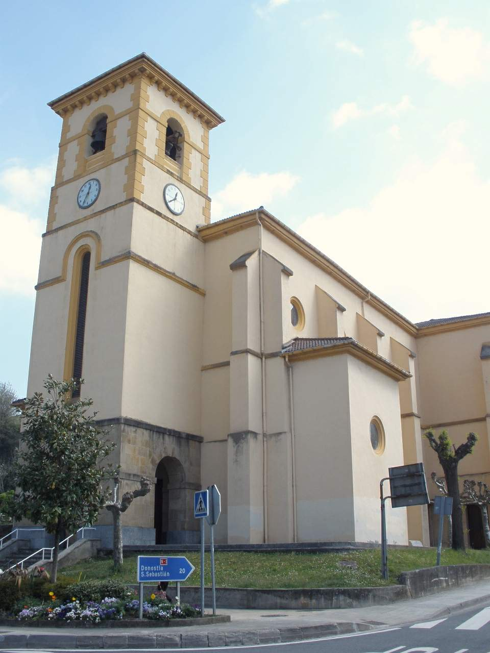 Villabona (Gipuzkoa) - Iglesia del Sagrado Corazón